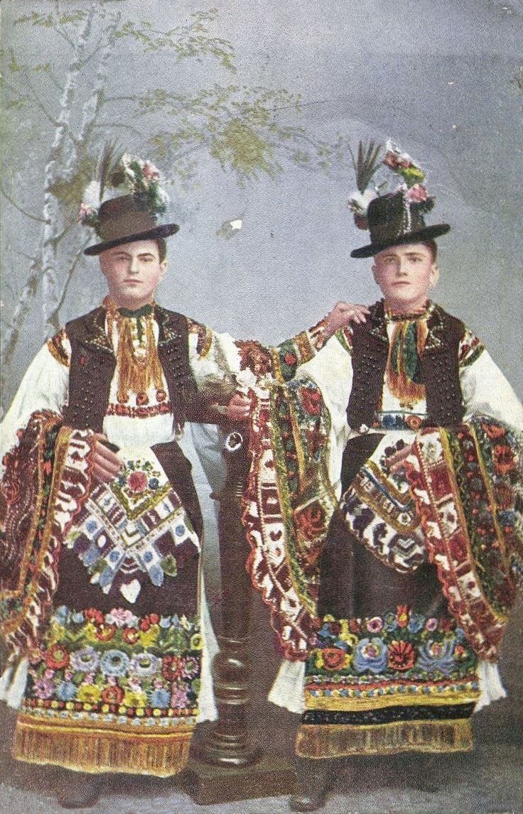 Mezőkövesdi népviselet 1915-ös képeslapon (Balázs Ferenc könyvkereskedéséből, Mezőkövesden)